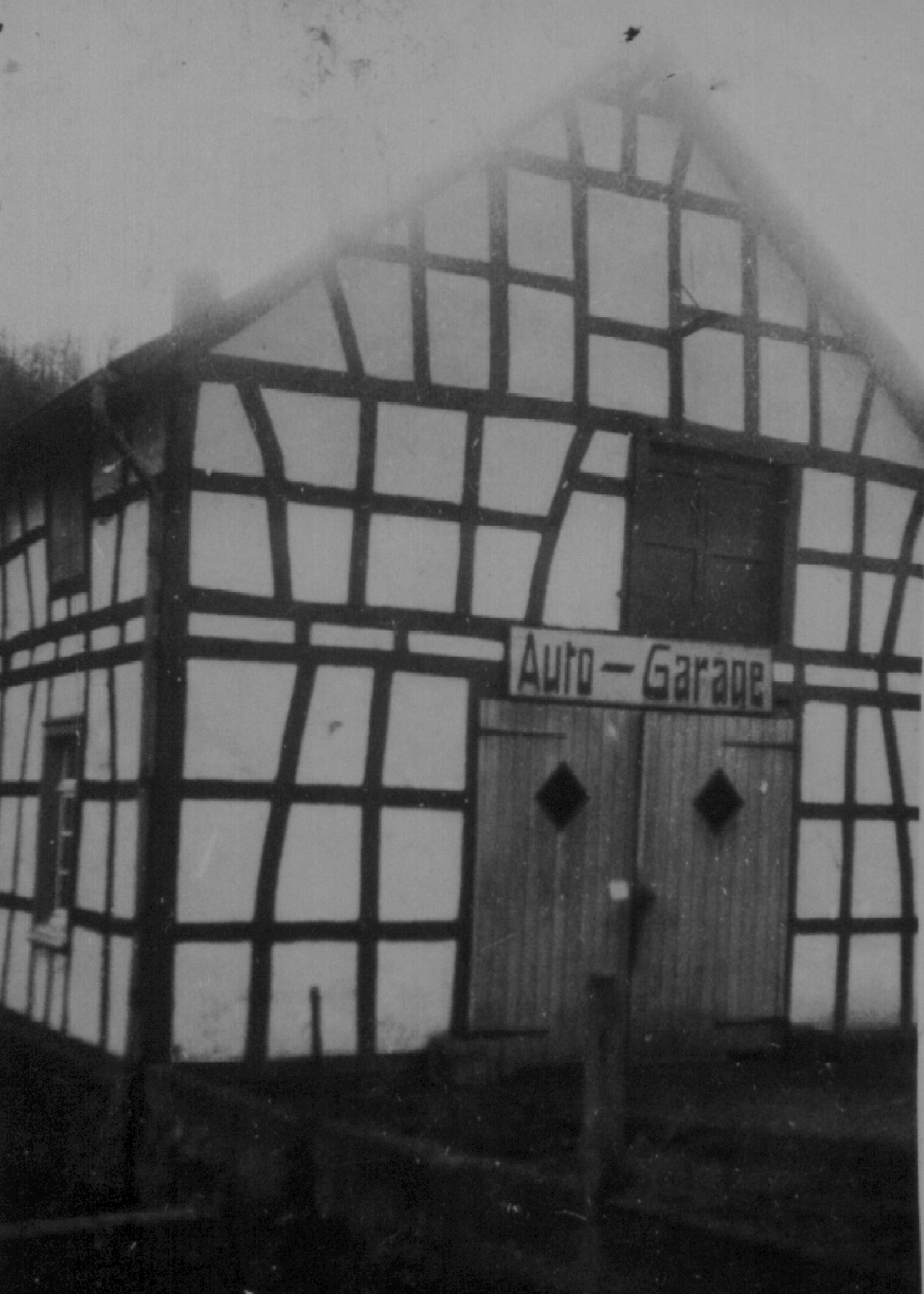 Hammer (Windeck), Nebengebäude